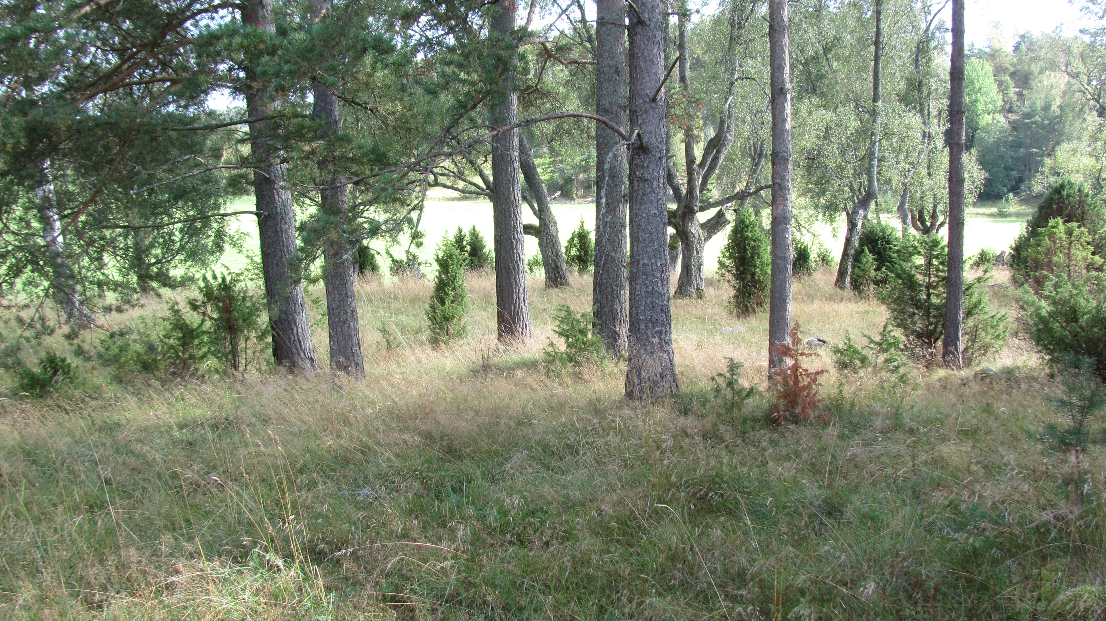 Gräberfeld "Ängisbacken" an der Wallburg Borgboda fornborg, Samtgemeinde Saltvik, Aland-Inseln, Finnland